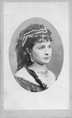 Antonina Hoffmann (1842-1897) jako Księżna Falconieri w sztuce "Dalila" Octave'a Feuilleta